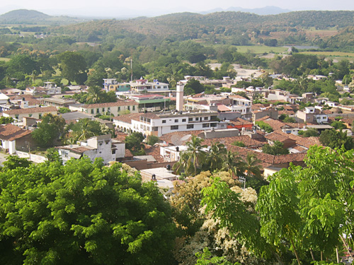 Panorámica de Tomatlán